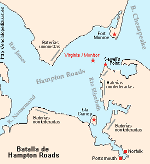 Teatro de operaciones de la batalla de Hampton Roads Imagen traída de Producida por Haylli - La misma queda liberada bajo la licencia GFDL